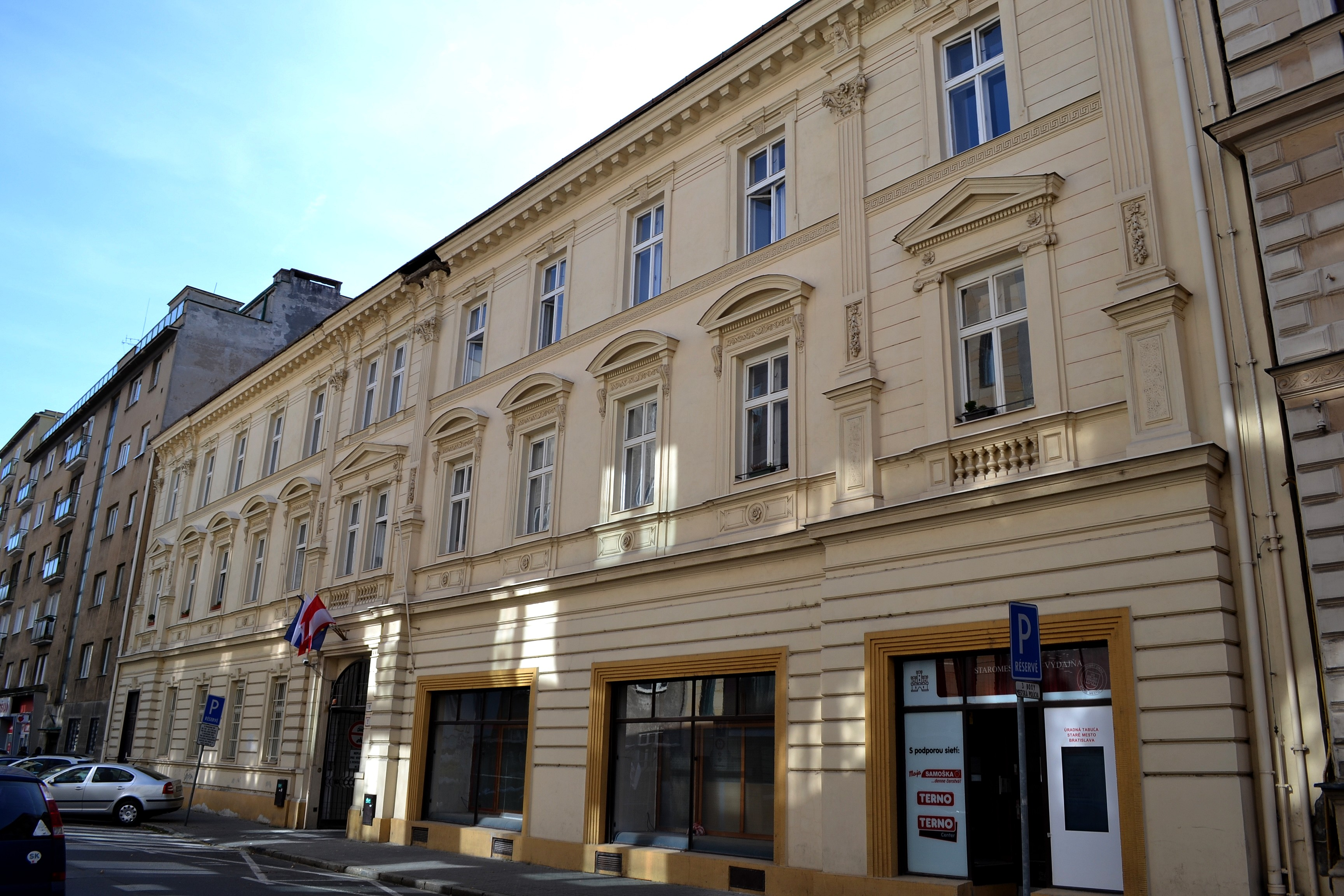 Medená ul. č. 2